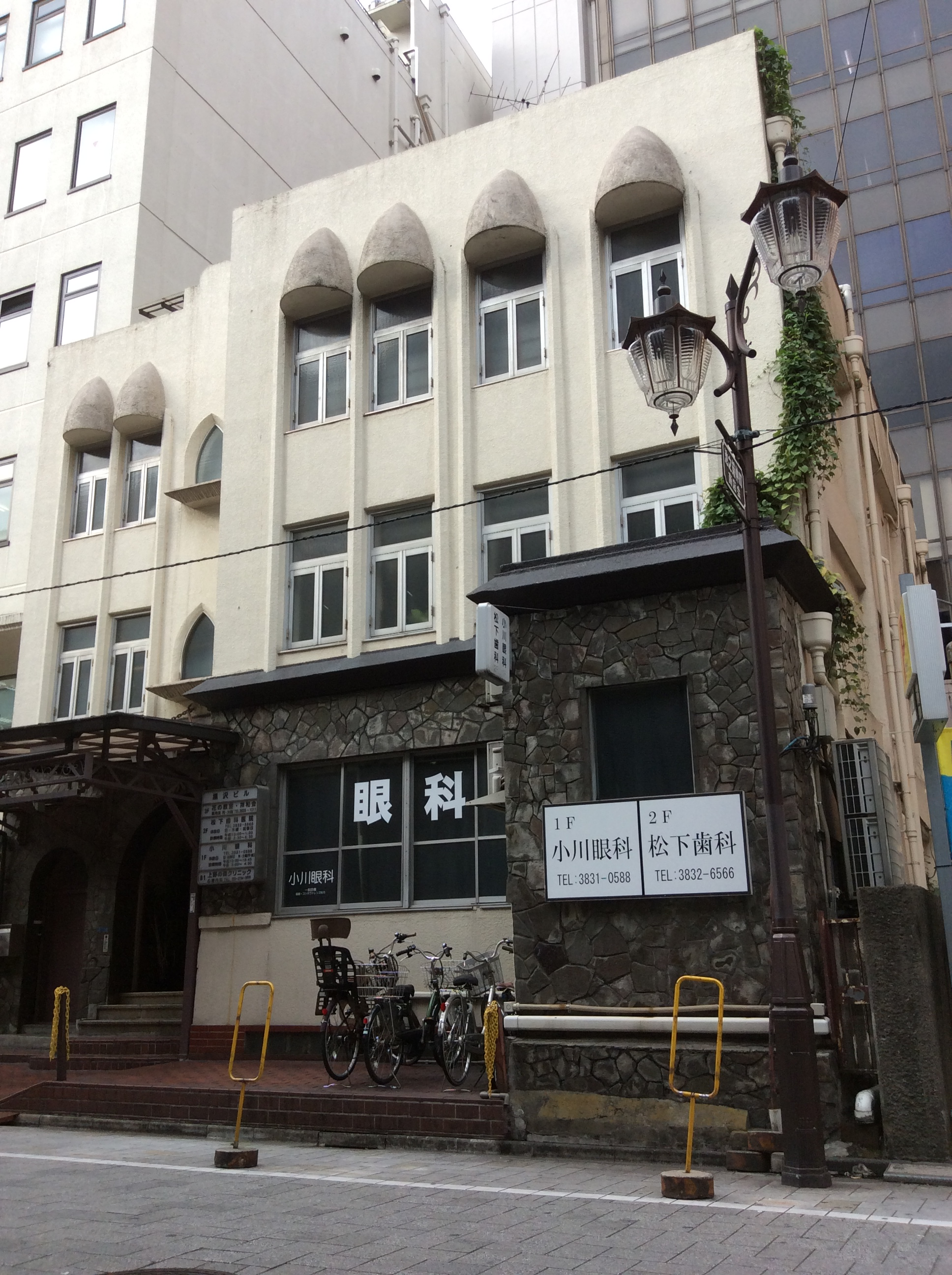 （2015年10月29日撮影）